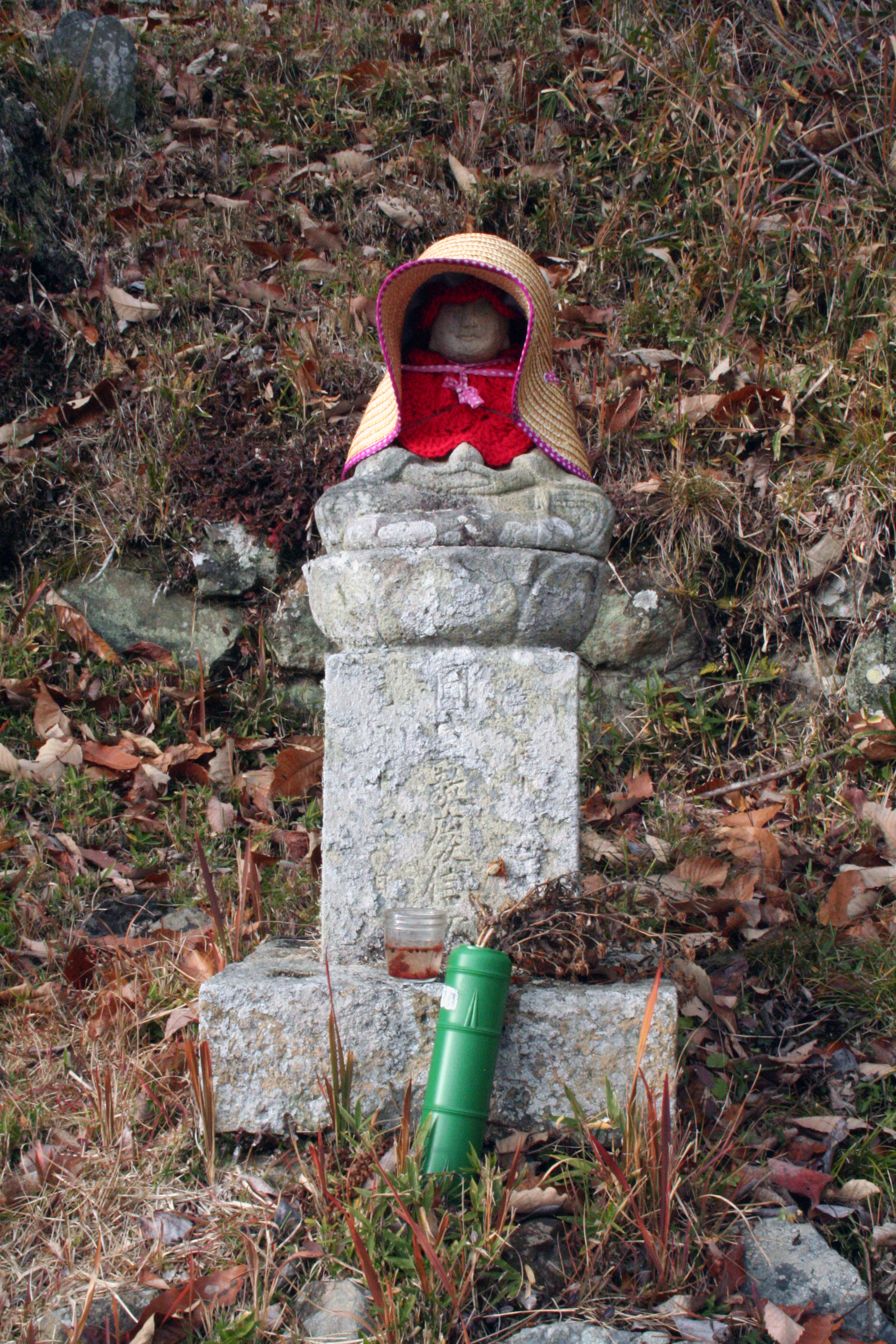 兵庫県たつの市新宮町牧にある香山城落武者の墓。1580年、豊臣秀吉により香山城が攻め落とされた際にここへ逃れてきた城主の一族の末裔が江戸時代に先祖達の菩提を弔う為に建てたとされている。